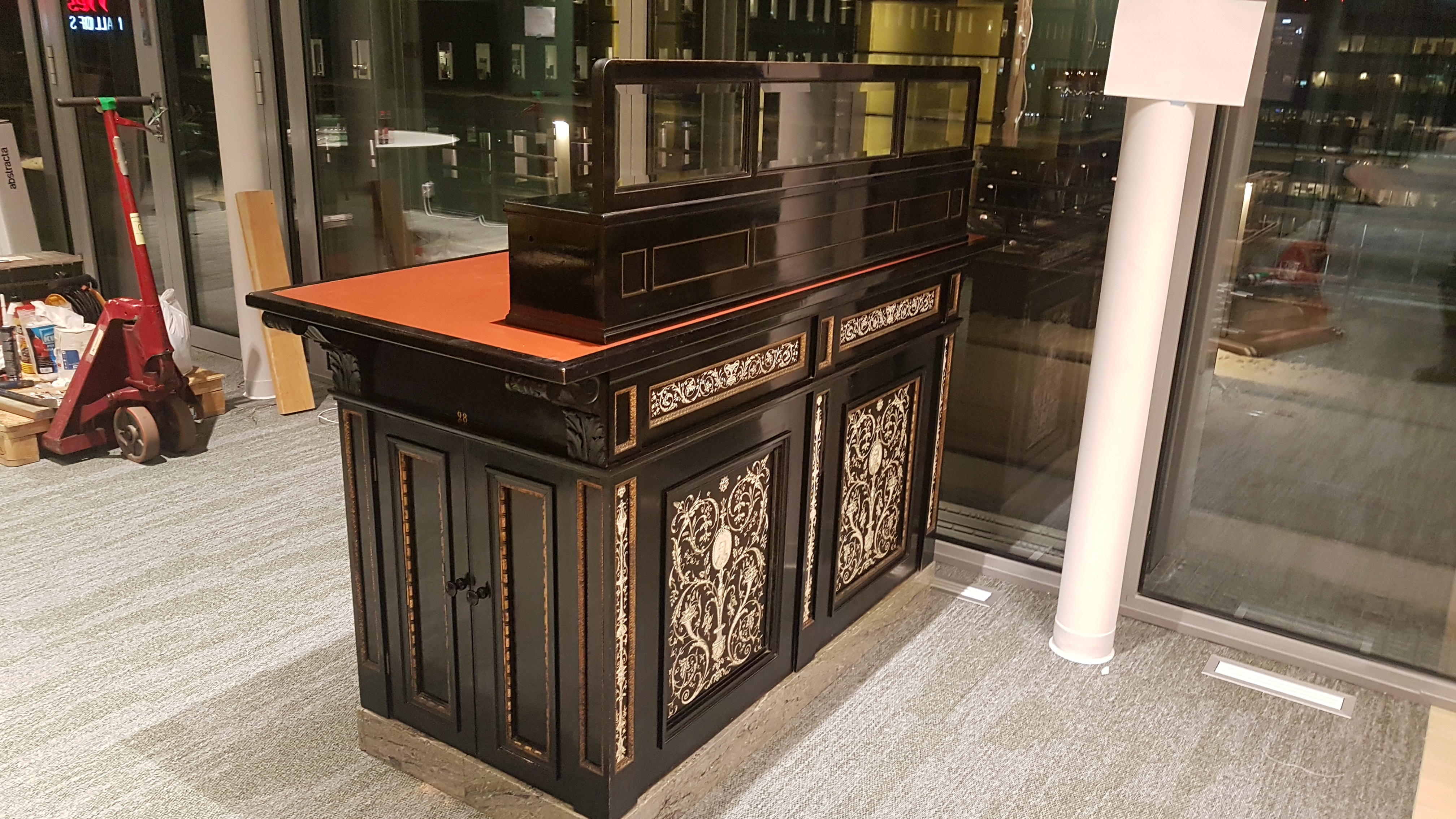 Apotek Nordstjernans officin uppställd av Tre Snickare AB på Apoteksbolagets huvudkontor i Solna.